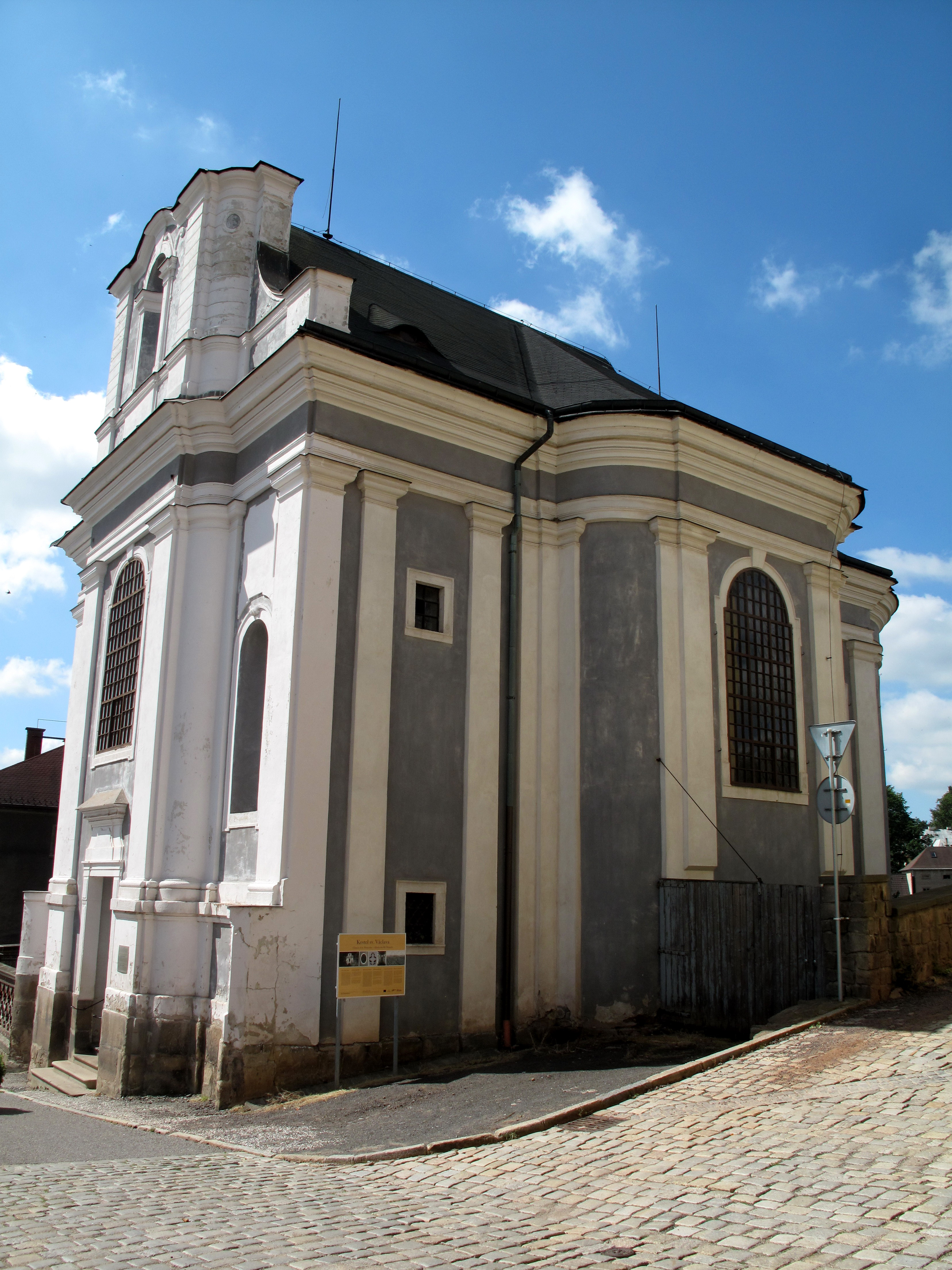 Česky: Broumov, kostel sv. Václava